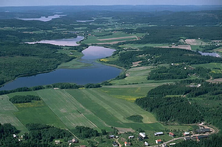 Motiv: Norasundet Nyckelord: Flygbilder, Riksintressen, Världsarv Kategori: Miljöer, Odlingslandskap Norasundet